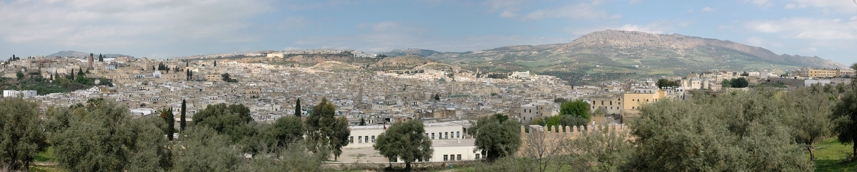 Fes